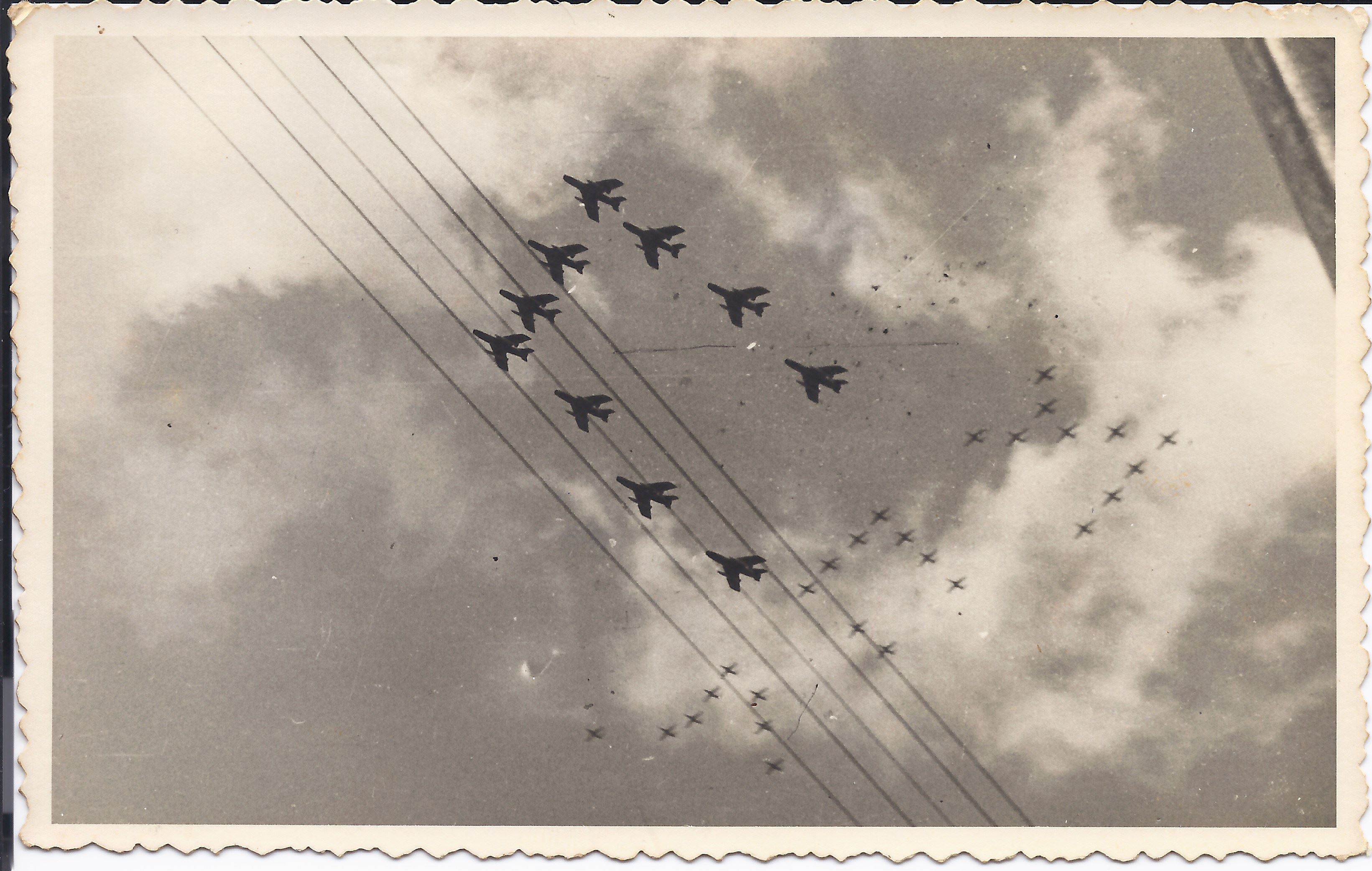 המיצעד הצבאי 1964 שהתקיים בבאר שבע ביום העצמאות ה 16 של ישראל